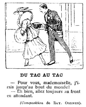 Pêle Mêle 9 7 16 Du tac au tac